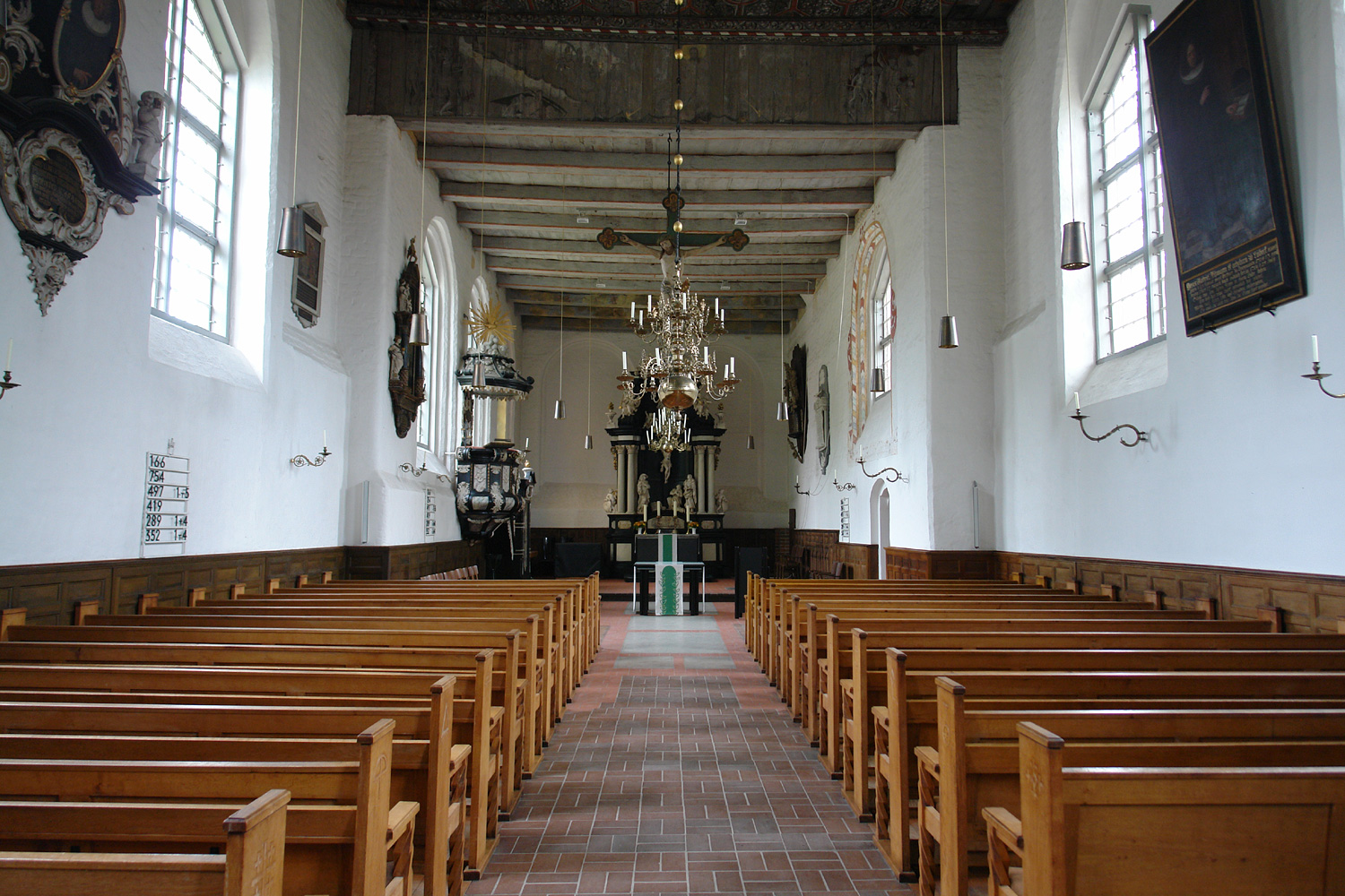 Kirche St. Lorenz (17.Jh.) in Lübeck-Travemünde